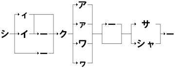 作者：わ､ 2006年6月11日 (日) 05:53 (UTC)(投稿者本人) 「ペイント」で作成。◆シークヮーサーの表記問題。